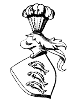 Wappen der Herren von Dorfeld (auch Dorffelt), Burgsitz zu Medenbach und Huxhohl (Lichtenfels (Hessen). Beschreibung: In Gold drei Fische übereinander, welches auf der Helmzier zwischen zwei goldenen Straußfedern wiederholt wird (hier nicht ausgeführt). 1144 genannt, 1600 oder 1609 im Mannestamm abgegangen.